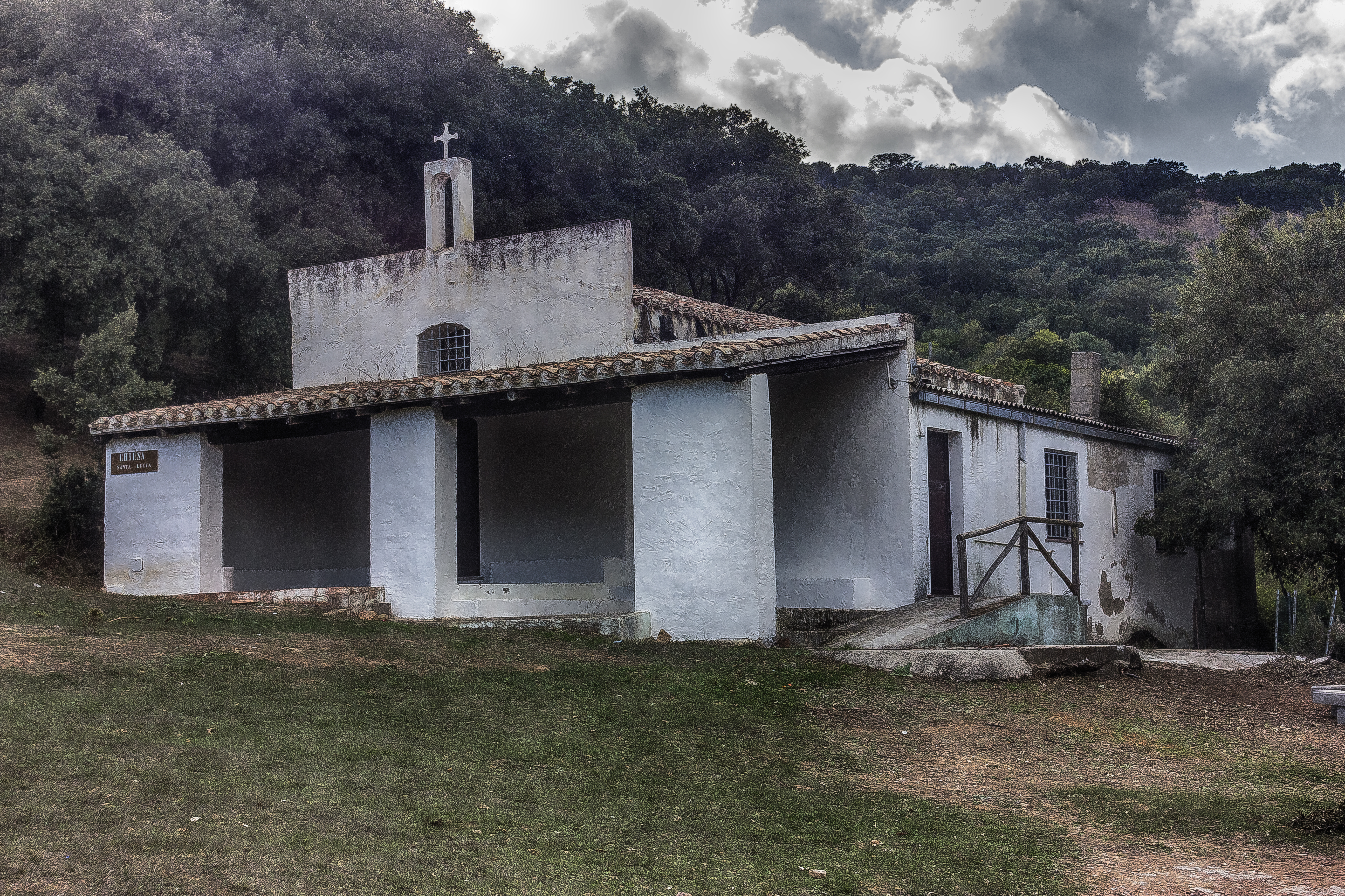 Sirri This is a photo of a monument which is part of cultural heritage of Italy.